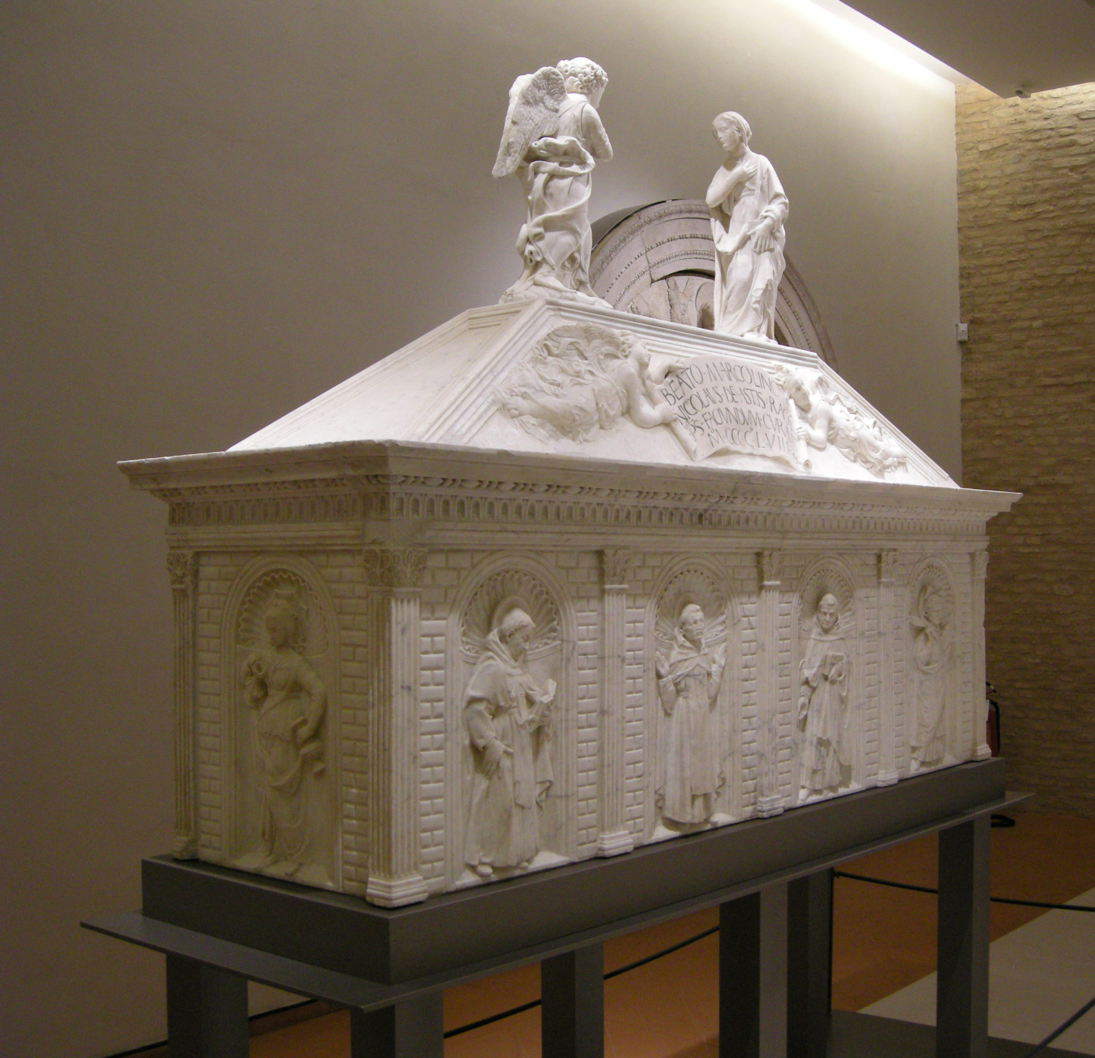 Antonio rossellino, sarcofago del beato marcolino amanni, 1458